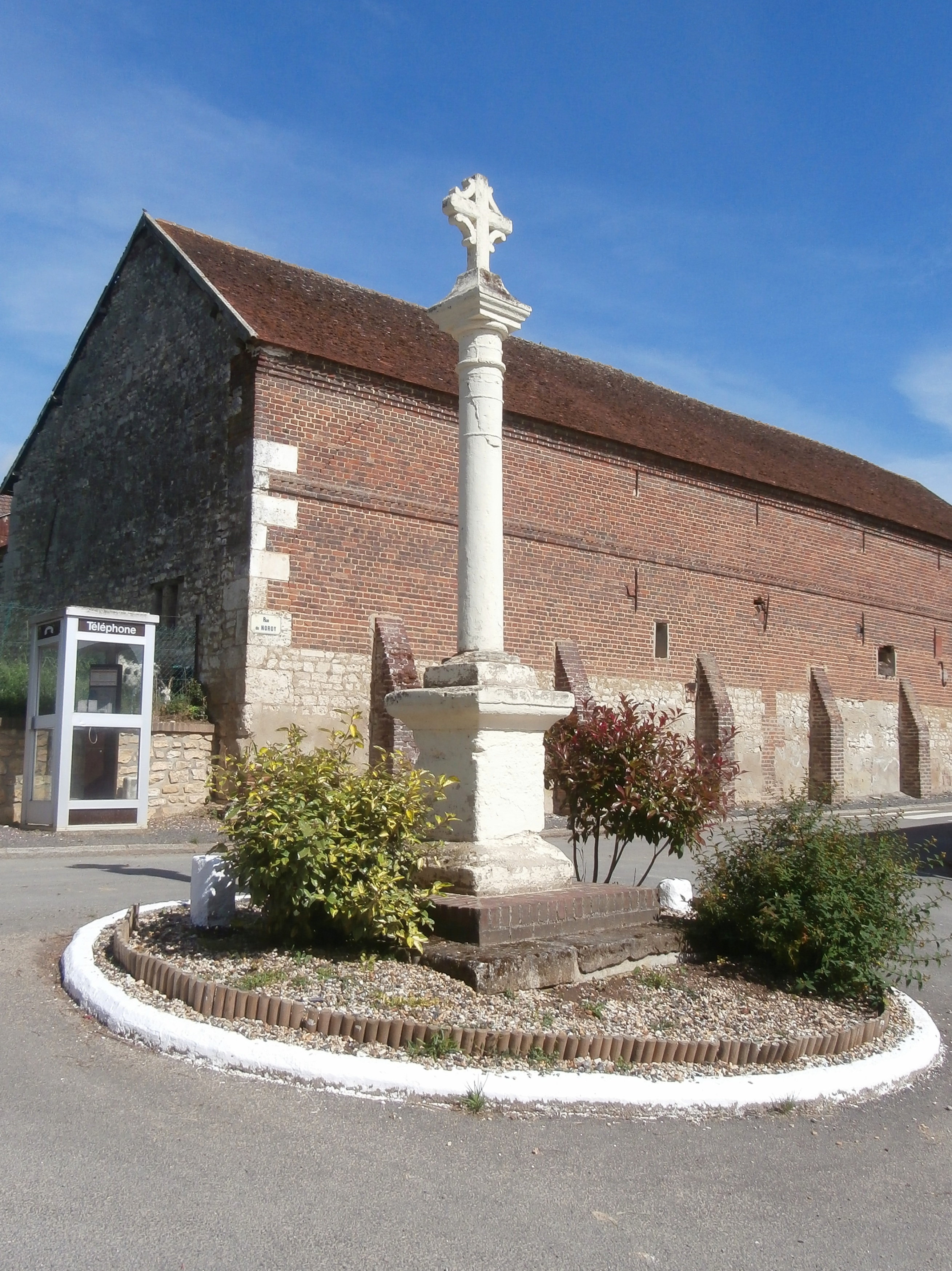 Calvaire à l'intersection entre les rues de l'église, de la mairie et de Noroy à Rémécourt (60).